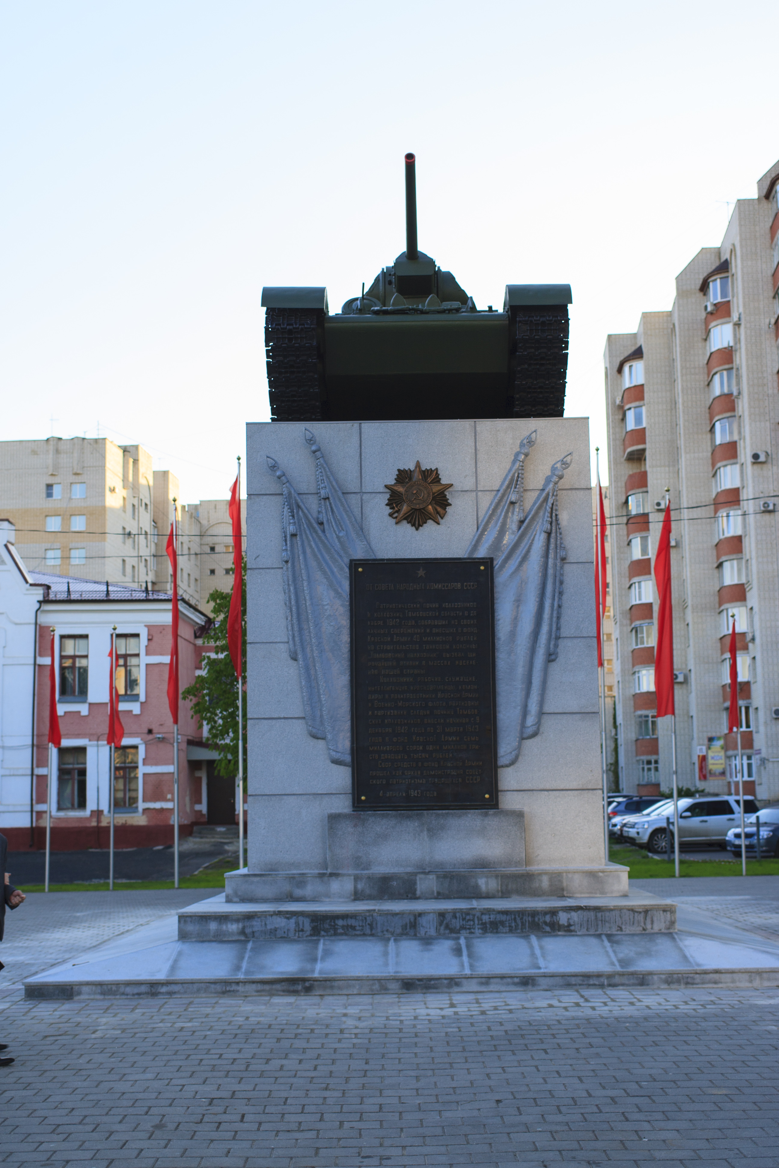 Монумент, воздвигнутый в ознаменование патриотизма колхозников Тамбовской области, собравших 40 млн руб. на постройку танковой колонны "Тамбовский колхозник": угол улиц Советской и Московской, Тамбов, Тамбовская область